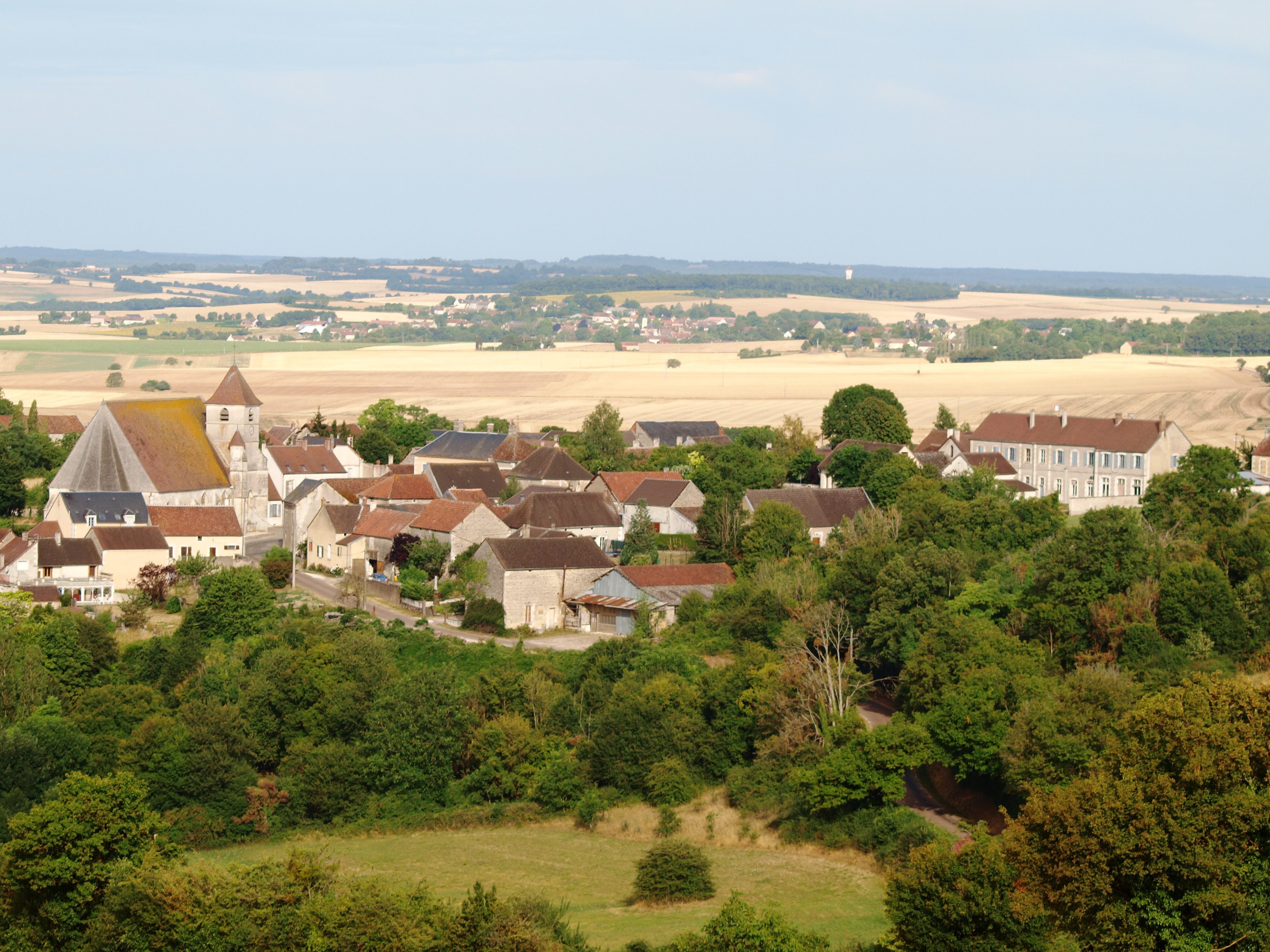 Taingy (Yonne, France)